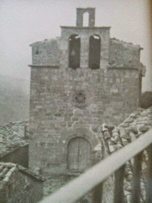 Església de Santa Maria de Montargull feta a l'abril de 1952 per la família Riart des del balcó de la seva casa a la Plaça de l'Estudi de Montargull. Cedida amablement per la família Riart